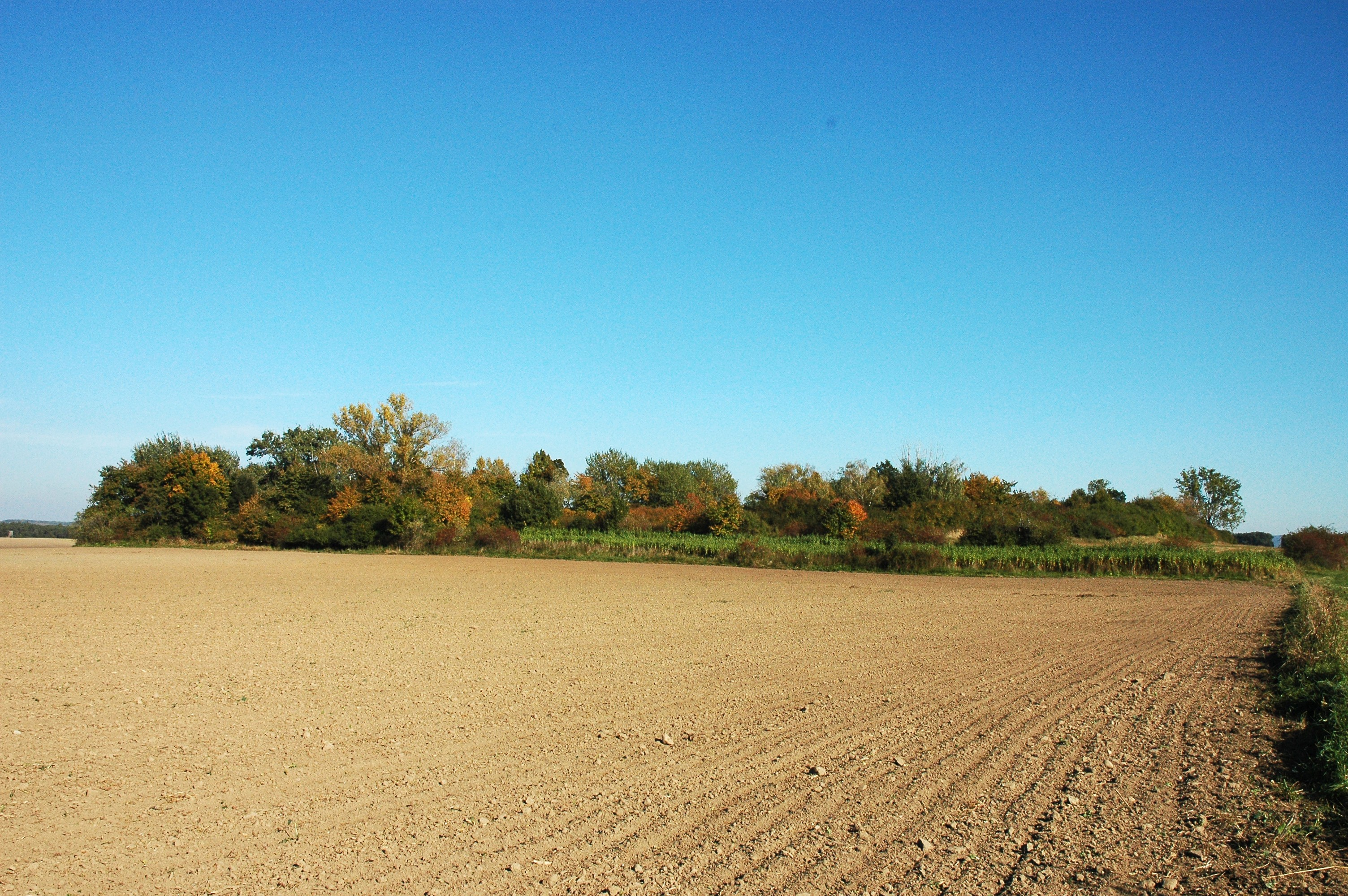 Natural Monument Kamajka, near Čáslav Town